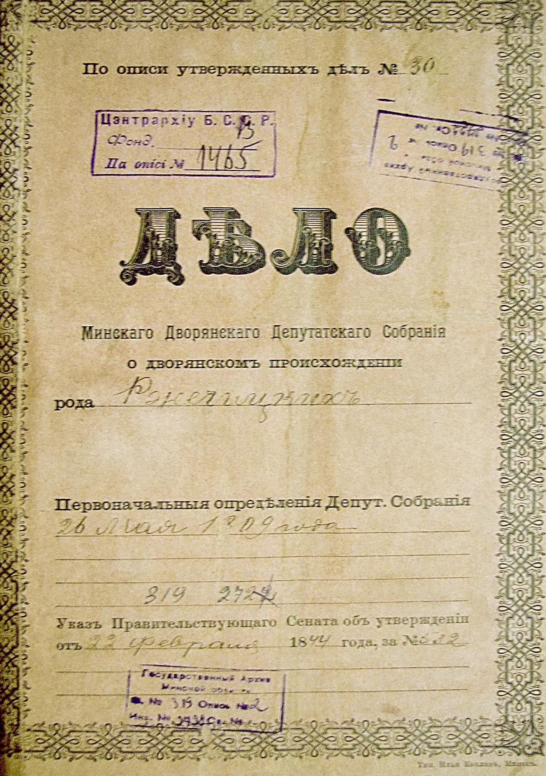 Обложка дела.